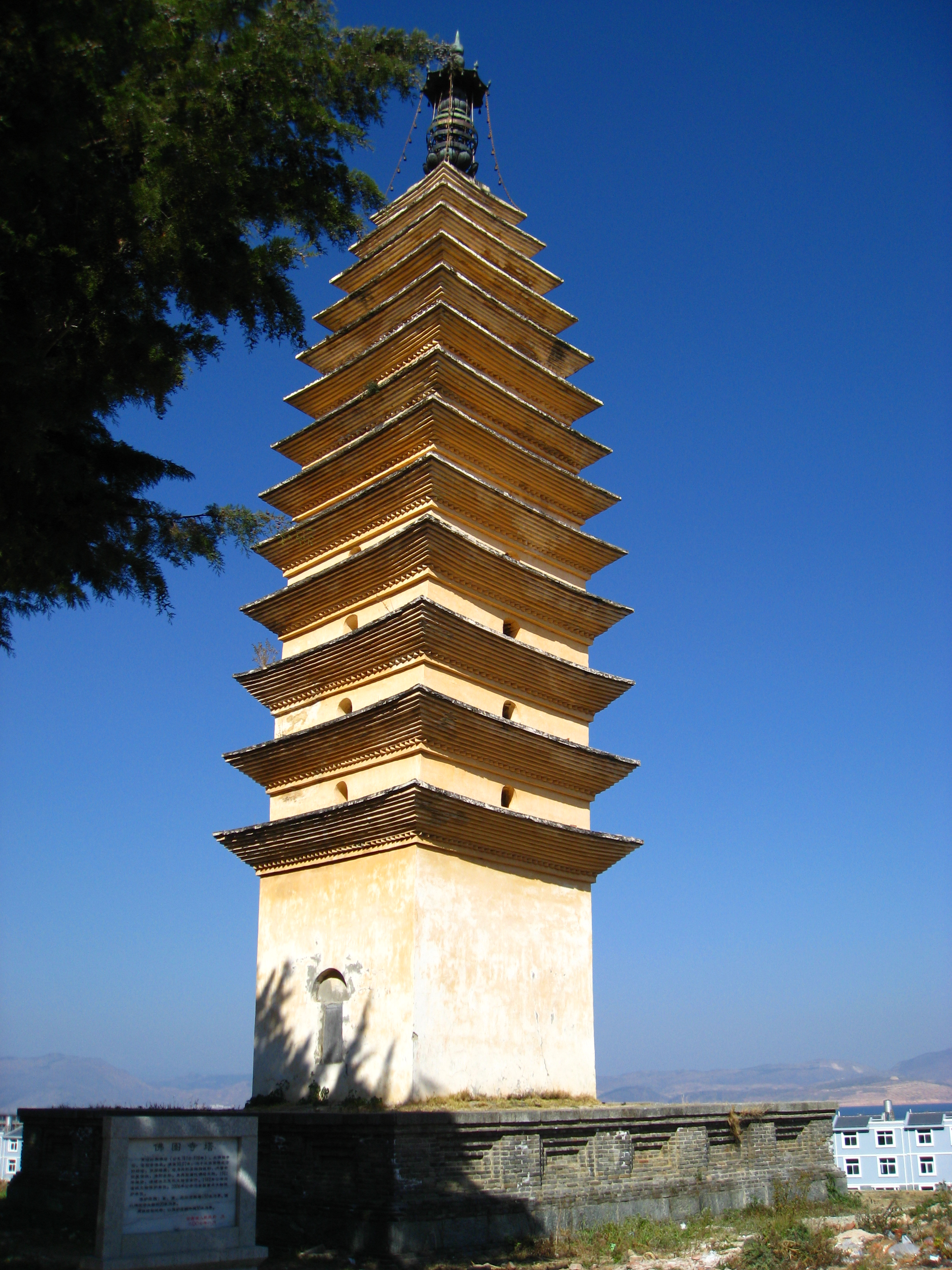 大理市下关的佛图寺塔